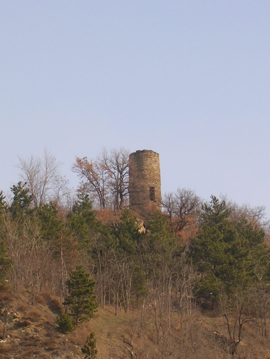 Tour de Chétoz a Quart (Valle d'Aosta, Italia) in località Villefranche.